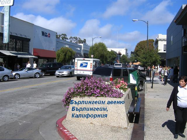 Бърлингейм авеню, една от основните търговски улици, Бърлингейм